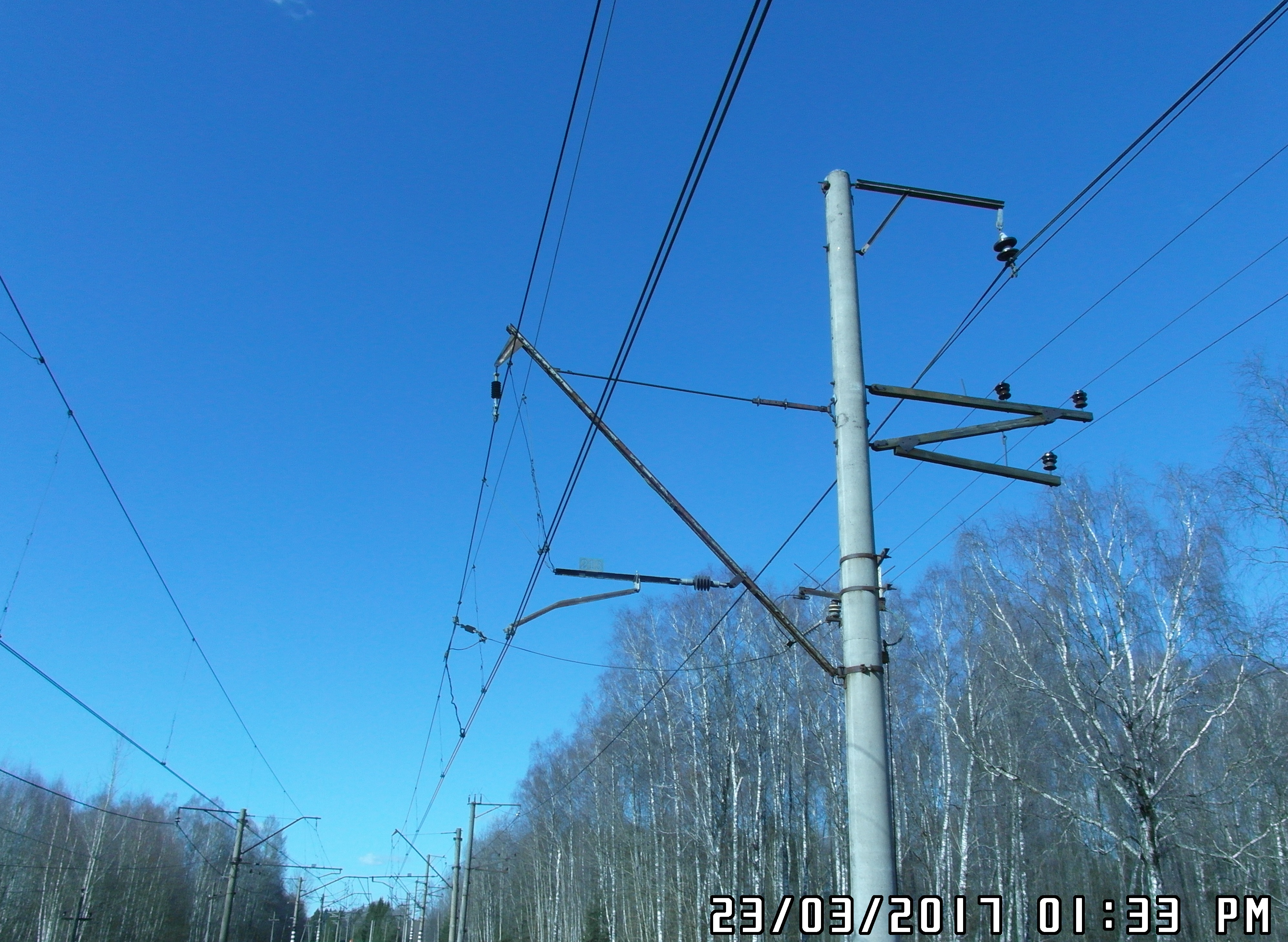 Dzelzceļa gaisa kontakttīkla ķēžu piekare